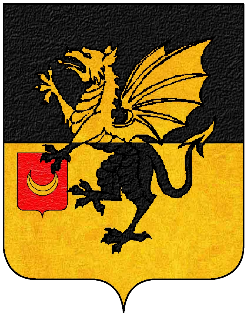 Stemma della famiglia Arnaldi, appartenente al patriziato di Venezia.